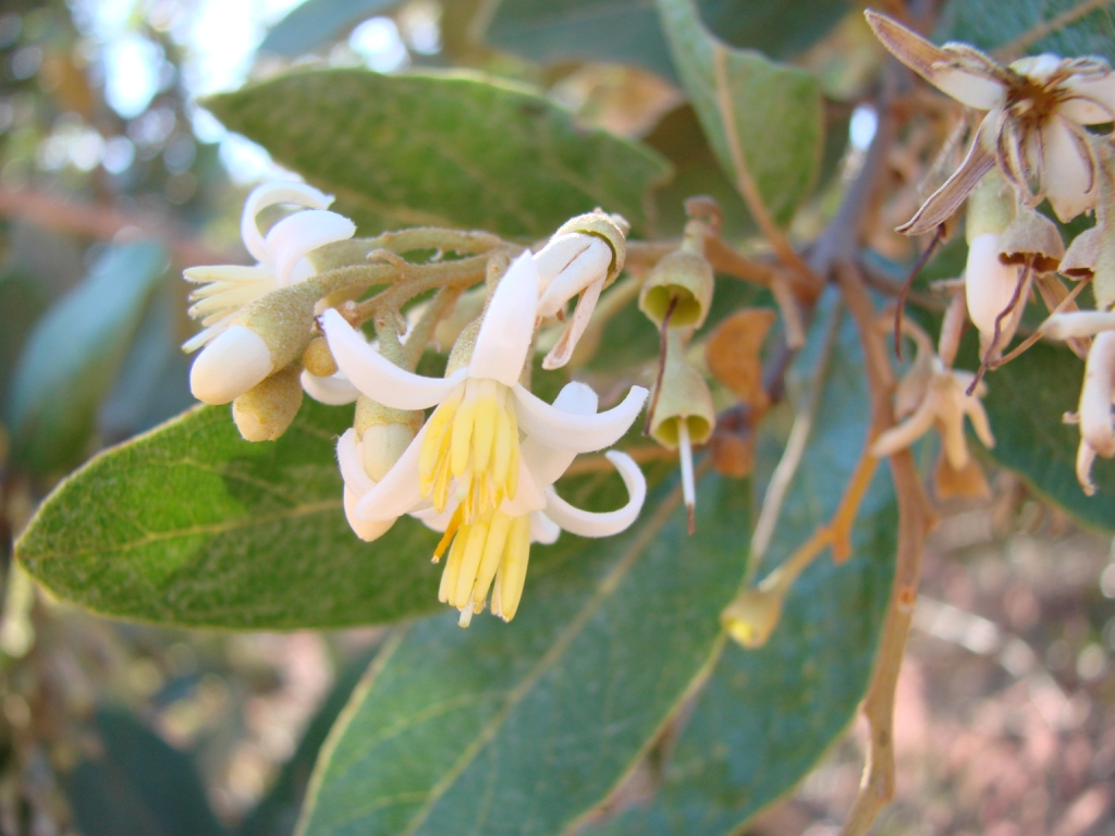 Styrax ferrugineus - STYRACEAE - Jardim Botânico de Brasília - DF - Brasil